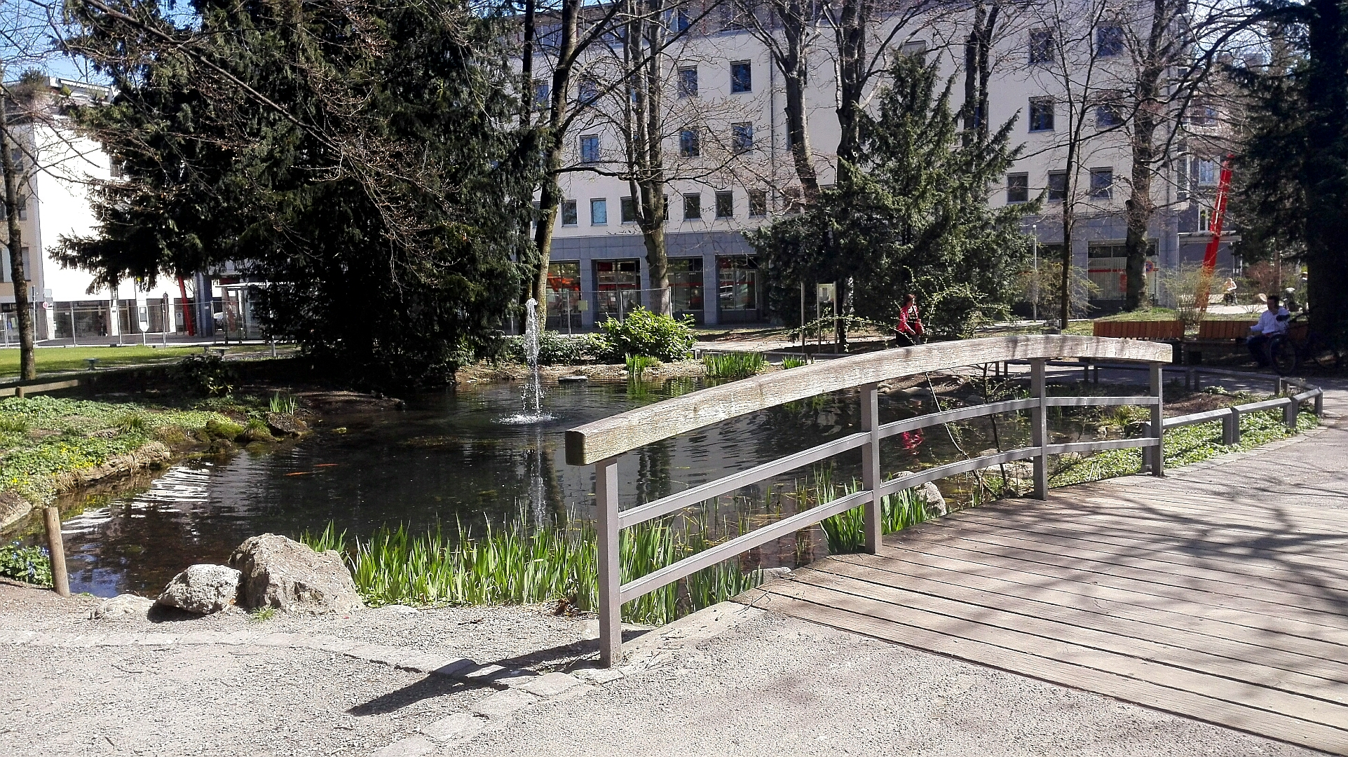 Teich im Stadtpark Kempten